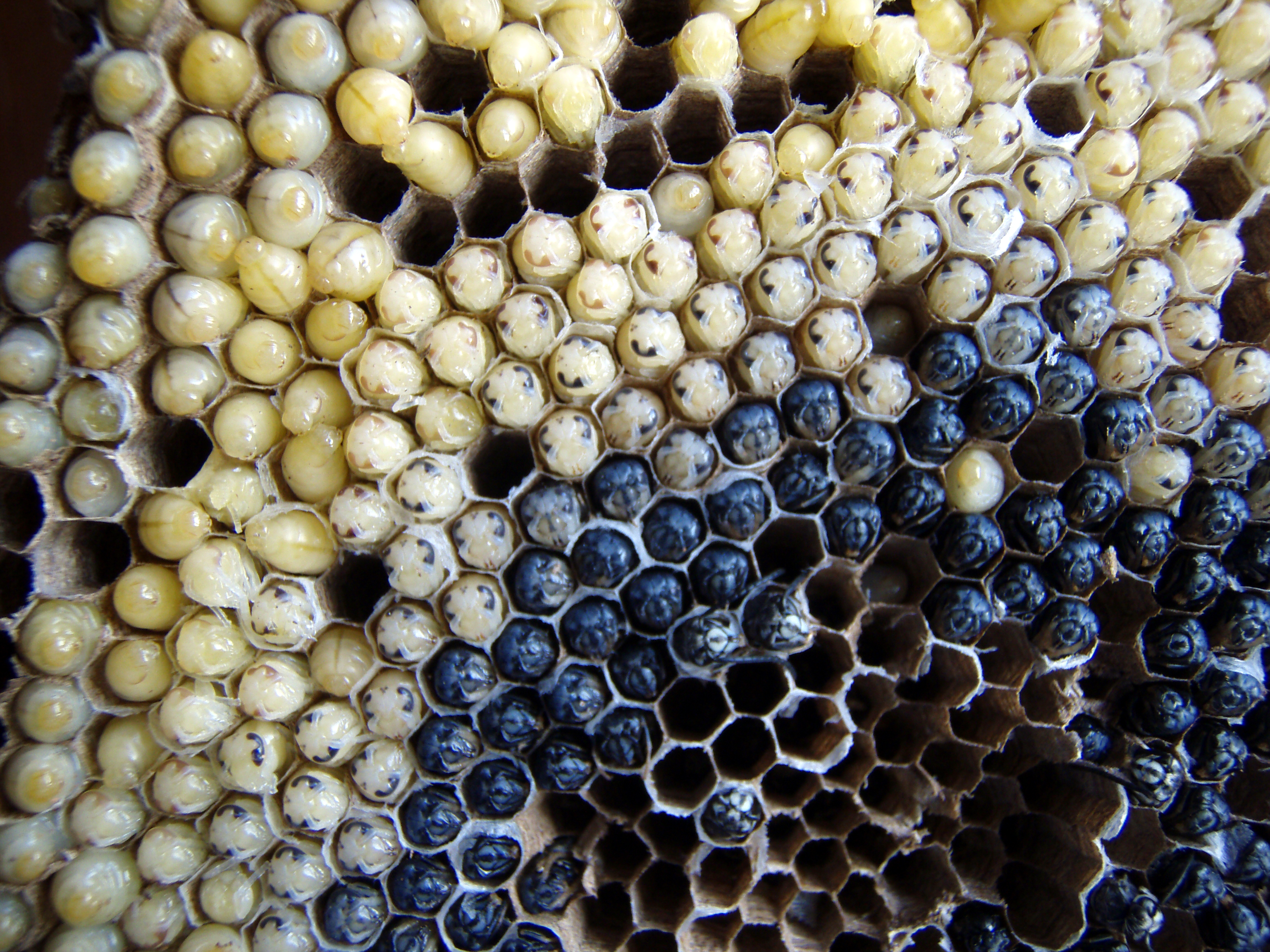 クロスズメバチの巣、サナギの膜を取り除いた状態。殆どのサナギは、巣の中心方向を向いている。